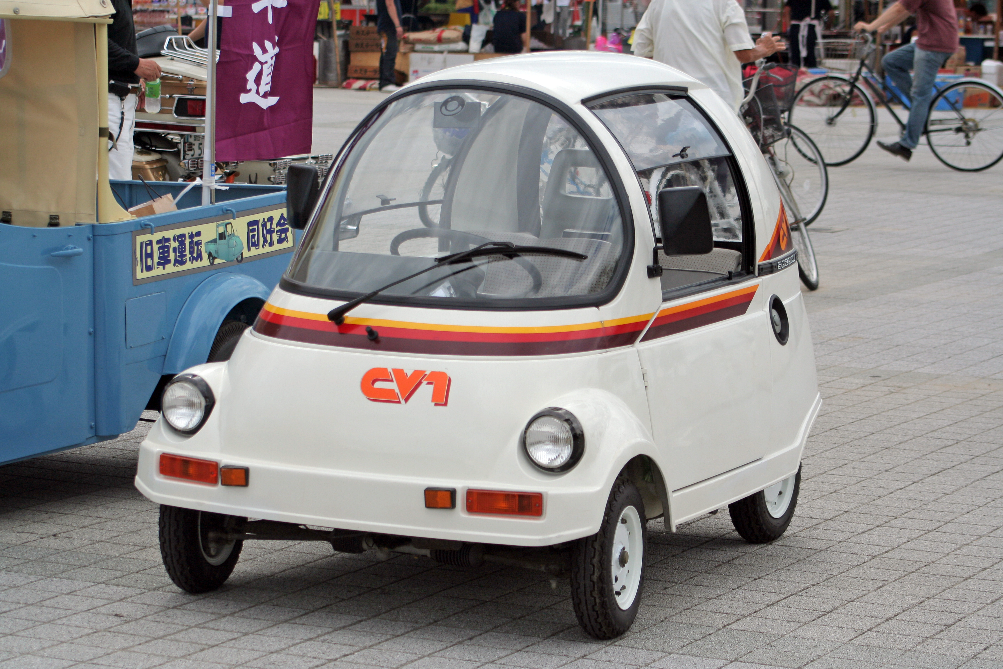 2012年8月3日・4日・5日に兵庫県姫路市姫路城南部にて開催された姫路お城祭の様子。祭2日目。